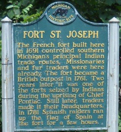 Fort Saint-Joseph